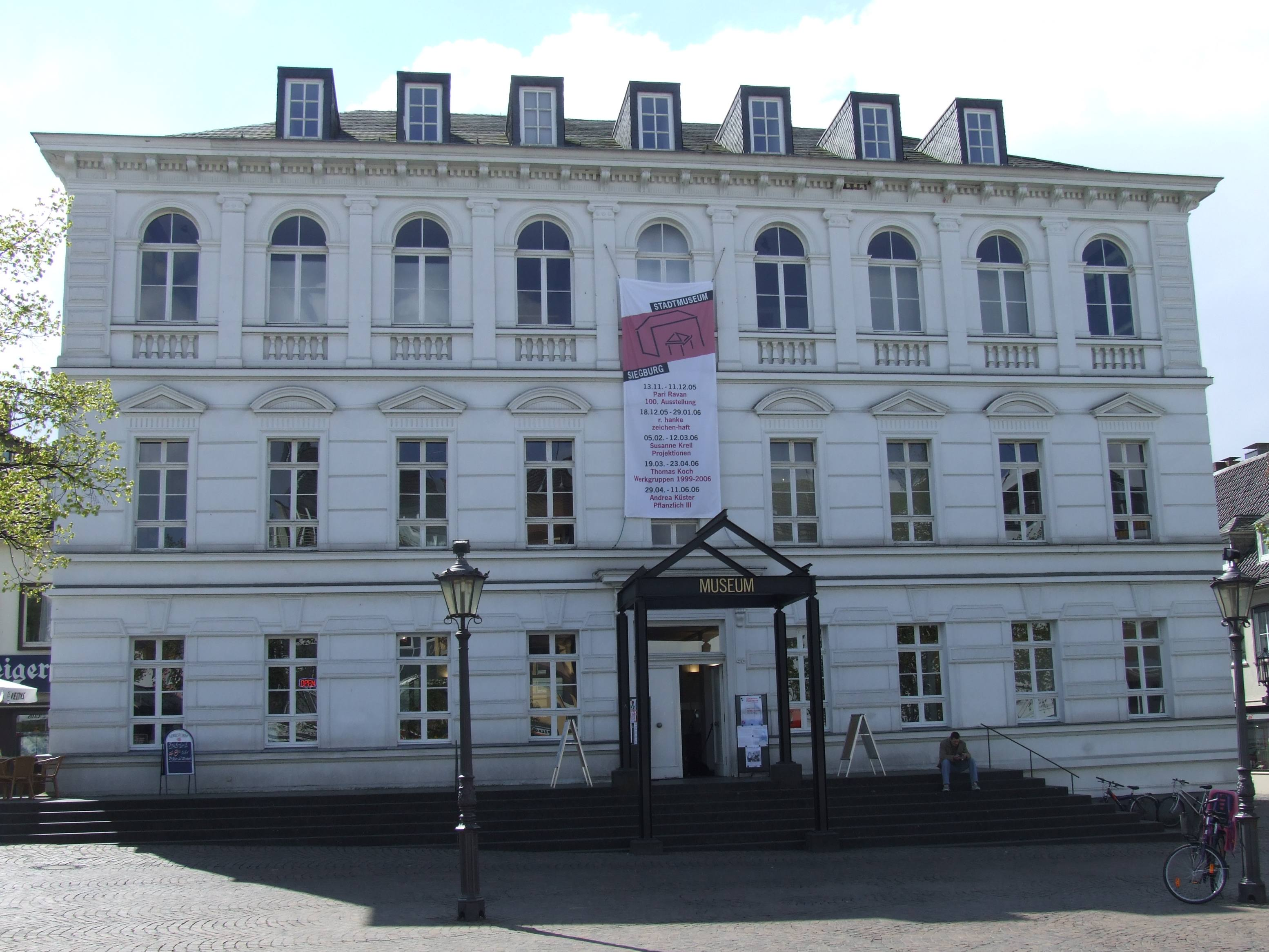 Geburtshaus von Engelbert Humperdinck in Siegburg, heute Stadtmuseum